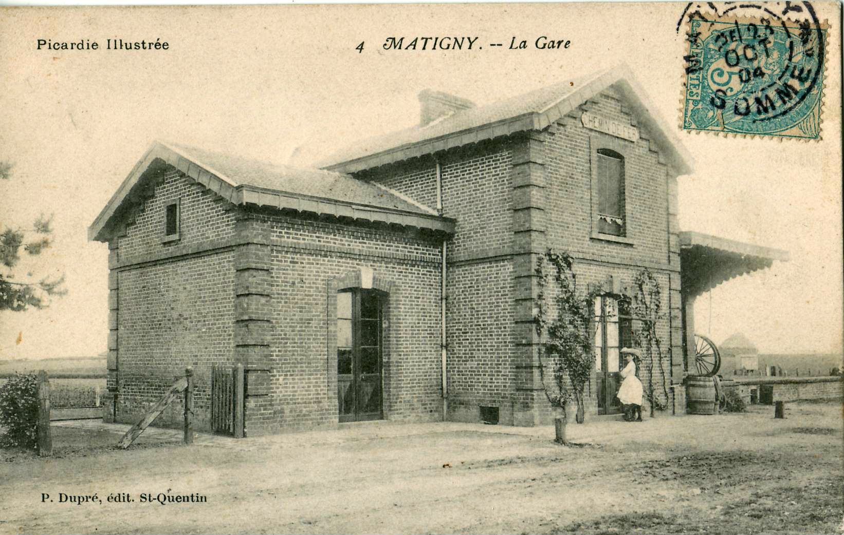 Carte postale ancienne éditée par P. Dupré, éditeur à Saint-Quentin, collection "Picardie illustrée", n°4 : MATIGNY - La Gare